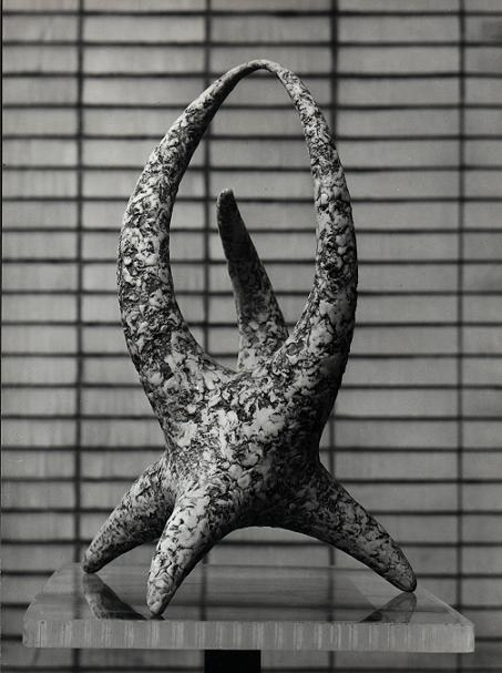 Pratvar, vytvořen z moduritu r. 1965